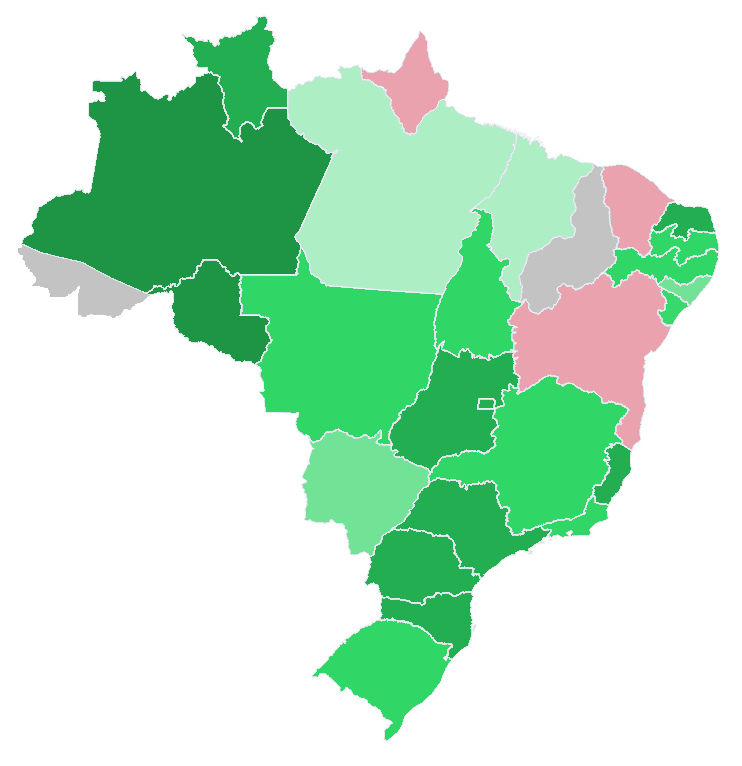 Mapa do resultado da votação no plenário da Câmara dos Deputados sobre o pedido de impeachment de Dilma Rousseff. Sim—90-100% Sim—80-89,99% Sim—70-79,99% Sim—60-69,99% Sim—50-59,99% Empate Não—50-59,99%